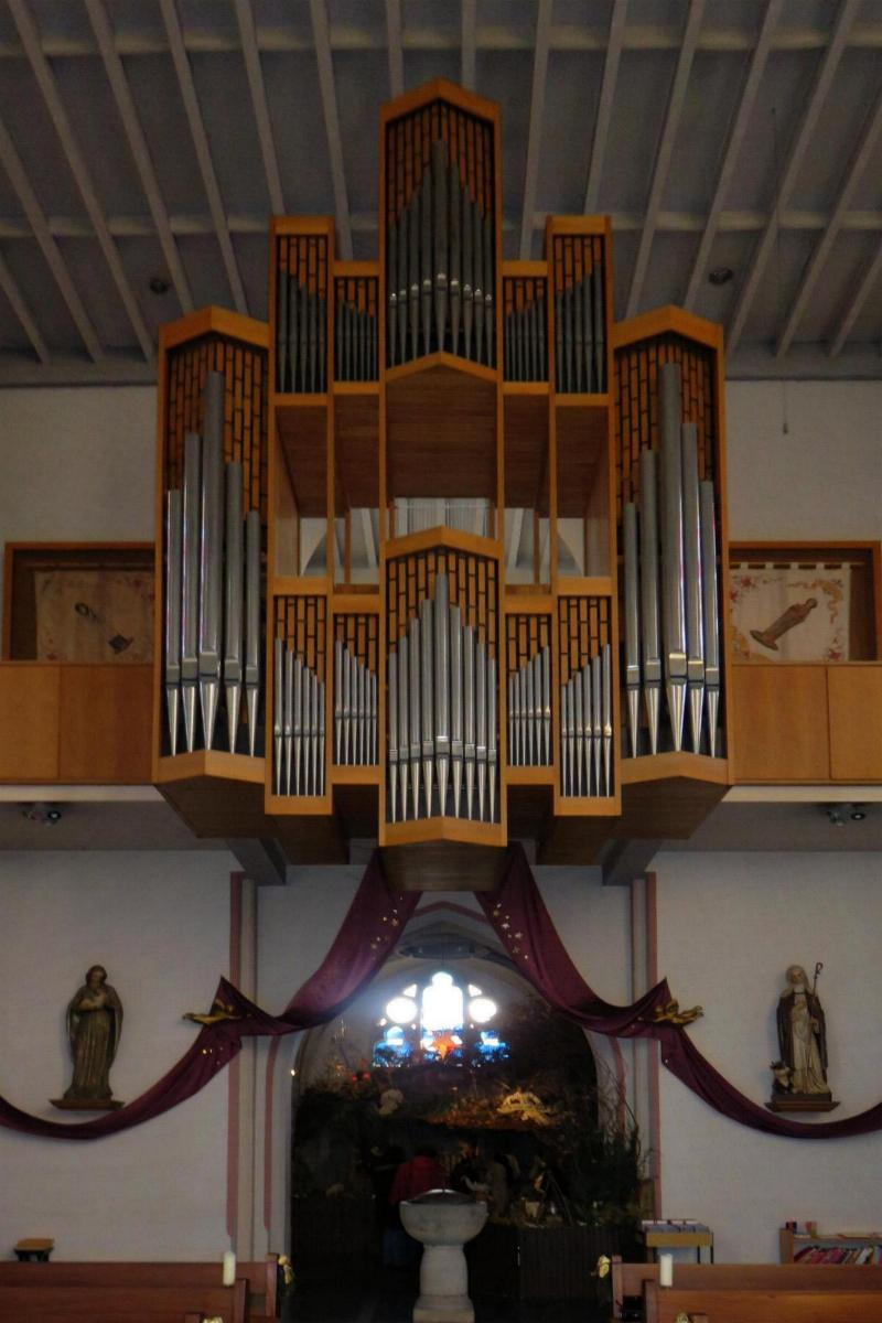 St. Brigida Baal